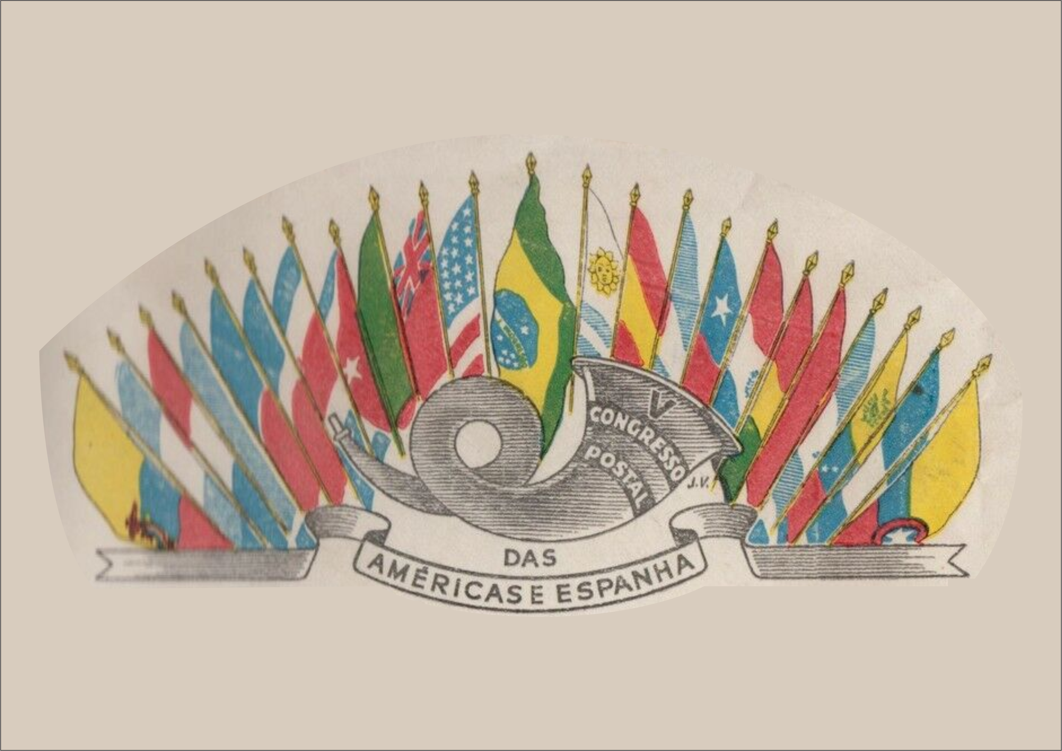 Panóplia com as bandeiras do países do V Congresso postal das Américas e Espanha, realizado no rio de Janeiro em 1946